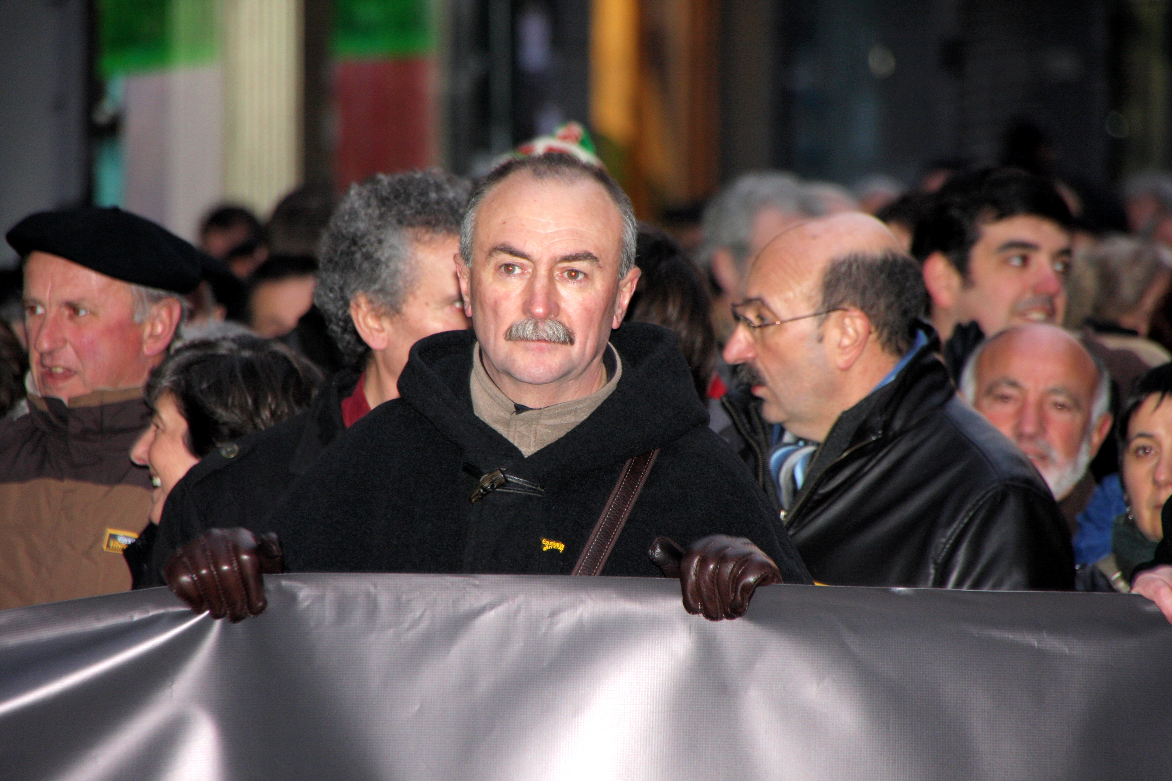 Xabier Oleaga 2009ko abenduan.